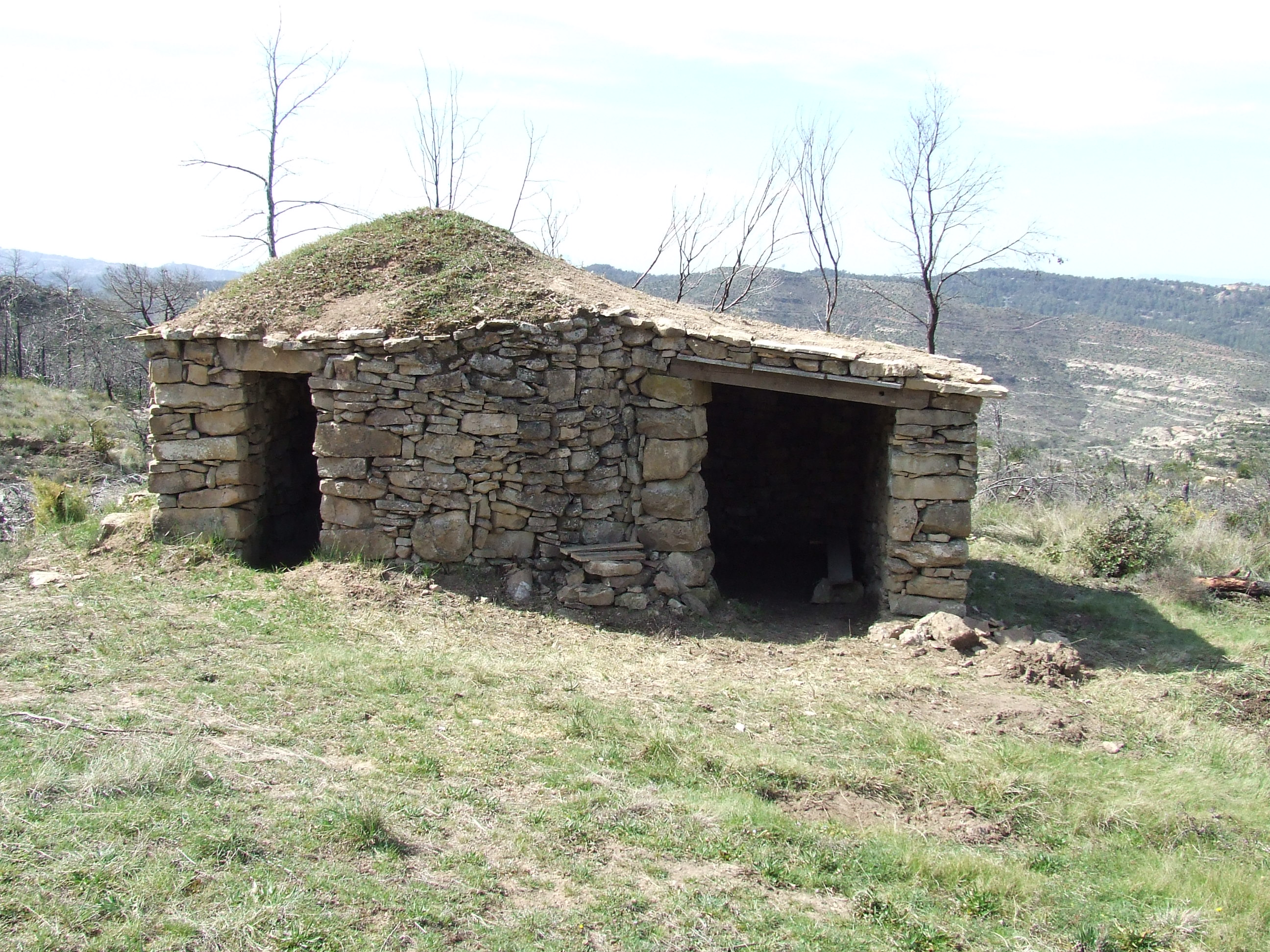 Barraca de la vinya del Calbet (Monistrol de Calders, Moianès)